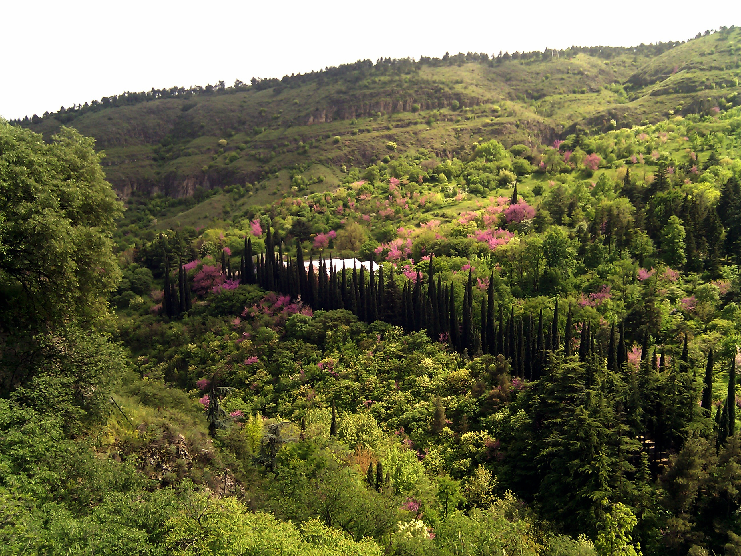 Botanic Garden, Tbilisi